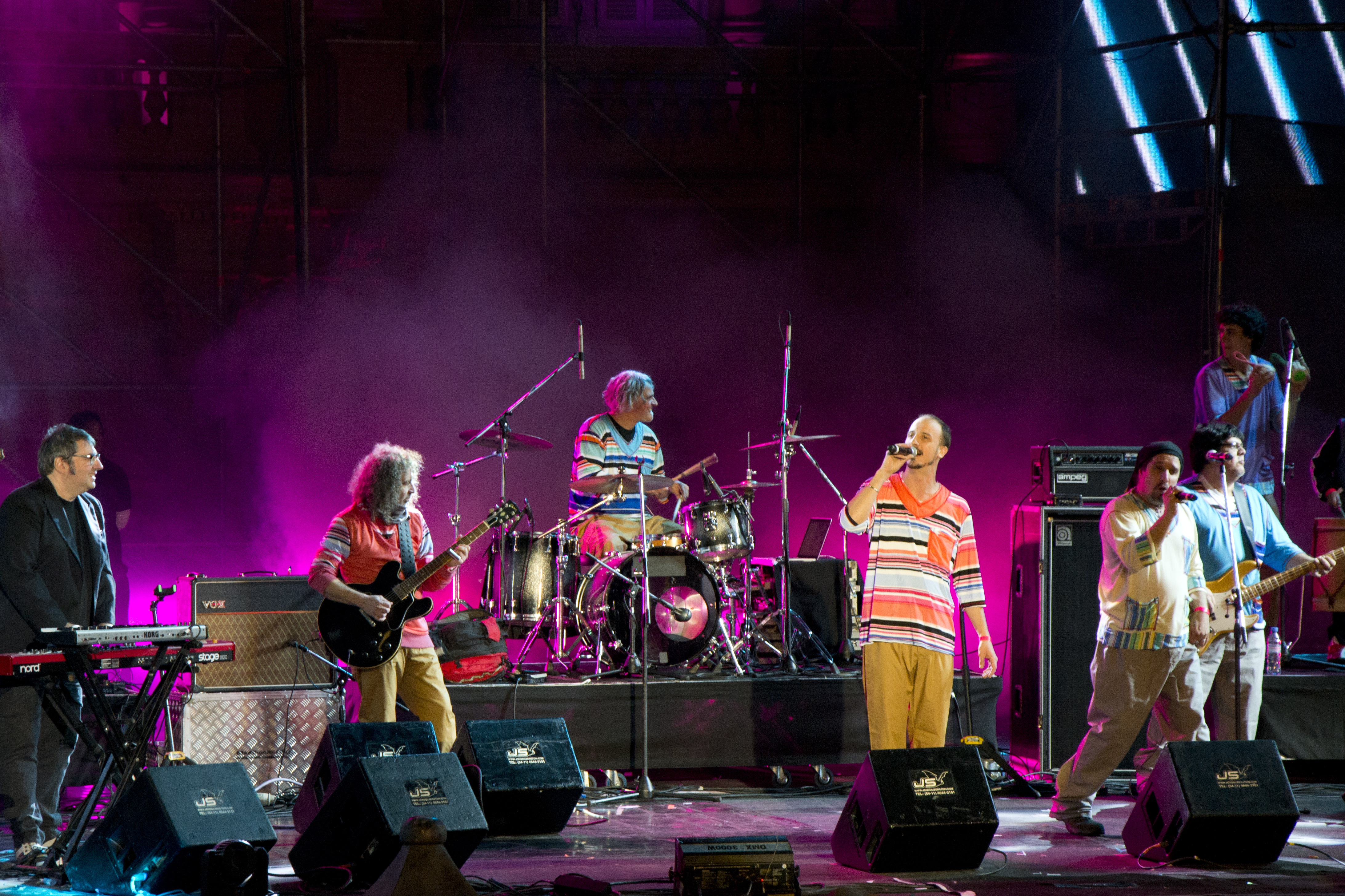 Bersuit Vergarabat en los festejos del 25 de mayo: Fiesta patria popular en la plaza de todos